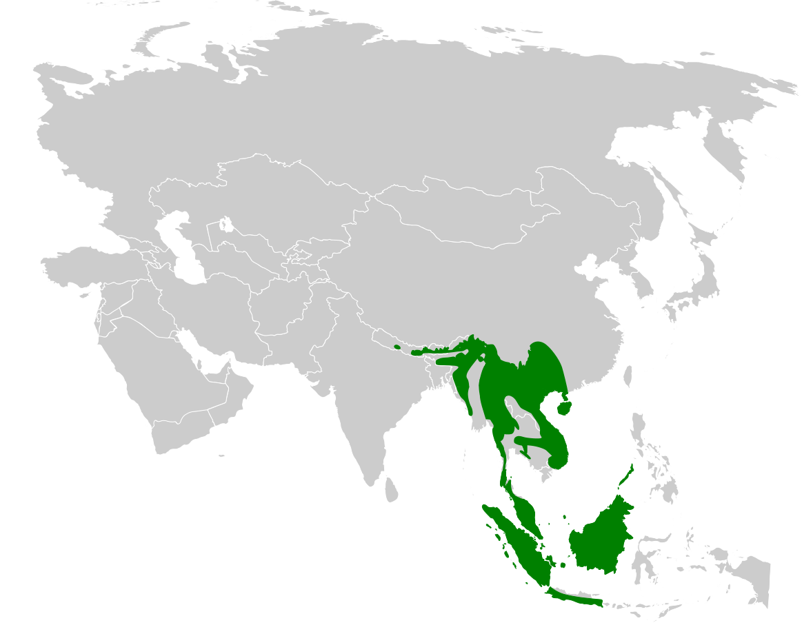 Alophoixus distribution map, only recognized species (without Thapsinillas affinis).